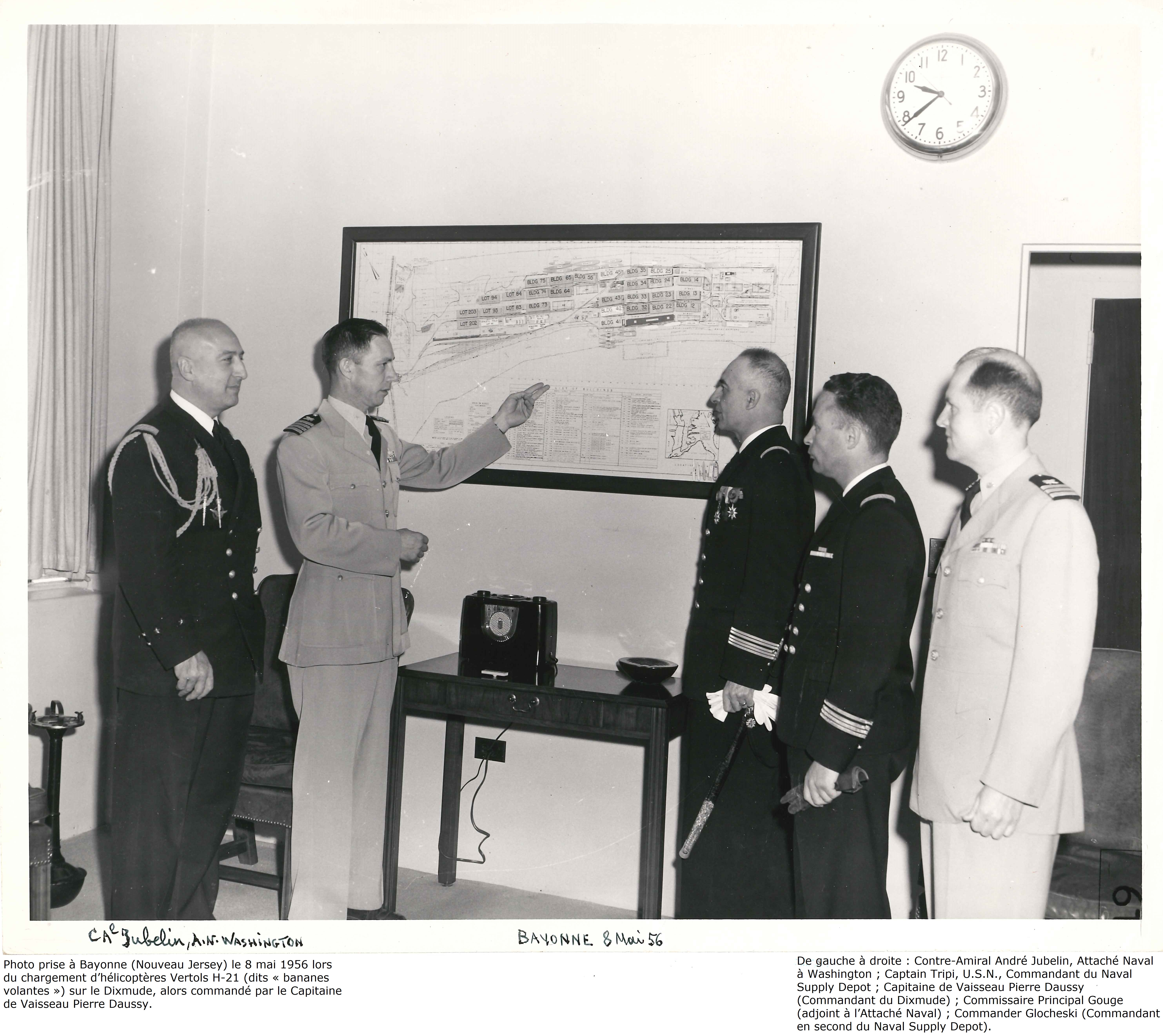 Photo prise à Bayonne (Nouveau Jersey) le 8 mai 1956 lors du chargement d’hélicoptères Vertols H-21 (dits « bananes volantes ») sur le Dixmude, alors commandé par le Capitaine de Vaisseau Pierre Daussy. De gauche à droite : Contre-Amiral André Jubelin, Attaché Naval à Washington ; Captain Tripi, U.S.N., Commandant du Naval Supply Depot ; Capitaine de Vaisseau Pierre Daussy (Commandant du Dixmude) ; Commissaire Principal Gouge (adjoint à l’Attaché Naval) ; Commander Glocheski (Commandant en second du Naval Supply Depot).